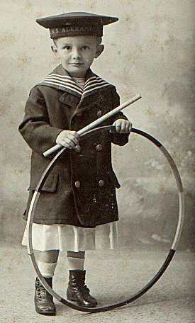 Junge mit Reifen (Spielzeug), um 1902-1905. Der 1900 geborene Georg Victor Praefcke, Sohn eines aus Mecklenburg stammenden königlich preußischen Offiziers, fotografiert in Straßburg im Elsass, trägt einen Kinder-Paletot im Stil der populären Matrosenanzüge.